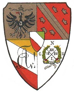 Studentenwappen des Corps Palaio-Alsatia zu Straßburg, später zu Frankfurt am Main. Heraldische Beschreibung: Rechts oben der Reichsadler auf goldenem Grund, rechts unten die Corpsfarben gelb-weiß-rot mit Zirkel; links oben das Wappen des Elsass, links unten gekreuzte Schläger mit Datum 12.I 1880 (Gründungsdatum) und die Buchstaben G-N-U für den Wappenspruch Gladius ultor noster. Das Mittelschild zeigt die grün-weiß-roten Farben der Landsmannschaft Alsatia, die aus der christlichen Verbindung Arminia hervorgegangen war. Alsatia wurde 1886 von Vosegina übernommen und als Corps Palaio-Alsatia rekonstituiert.